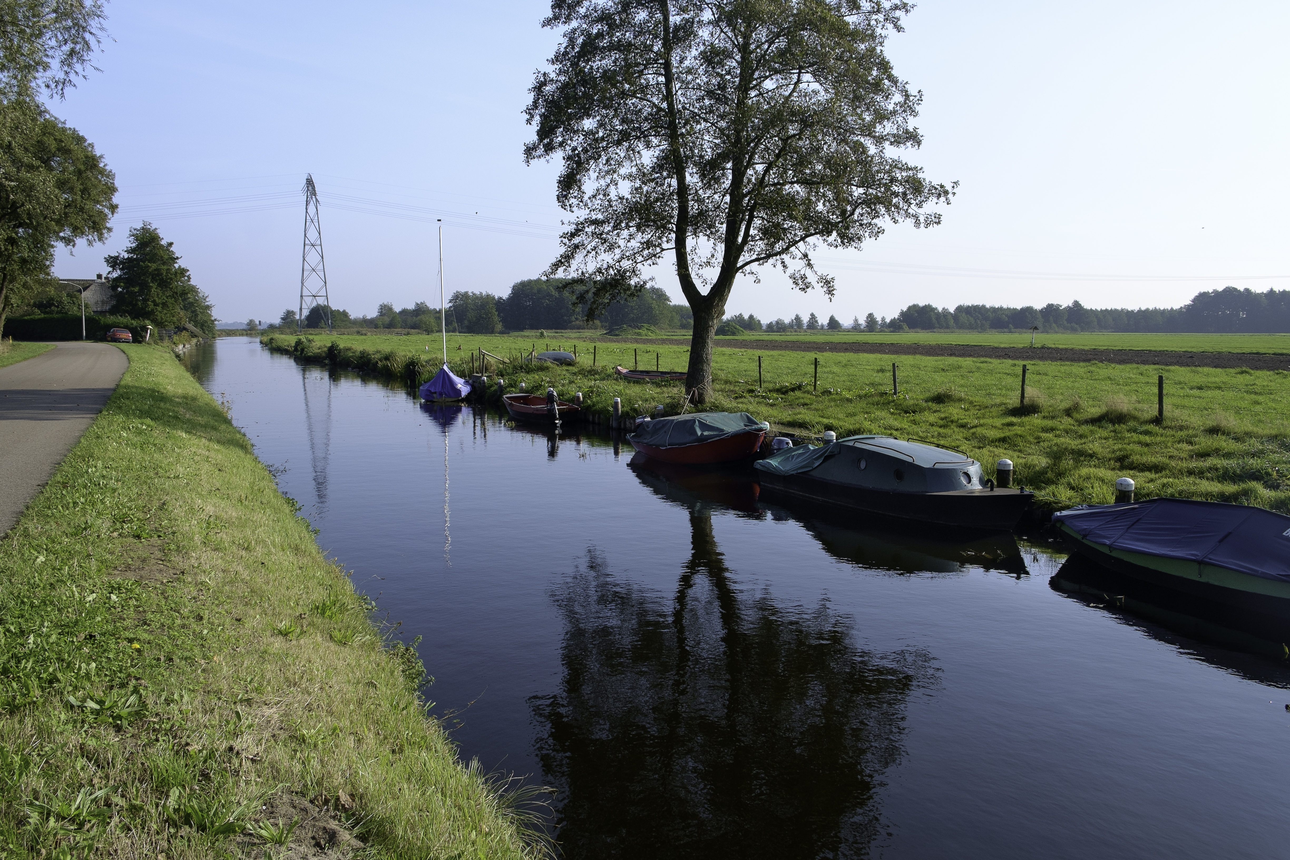 Noordlaardervaart